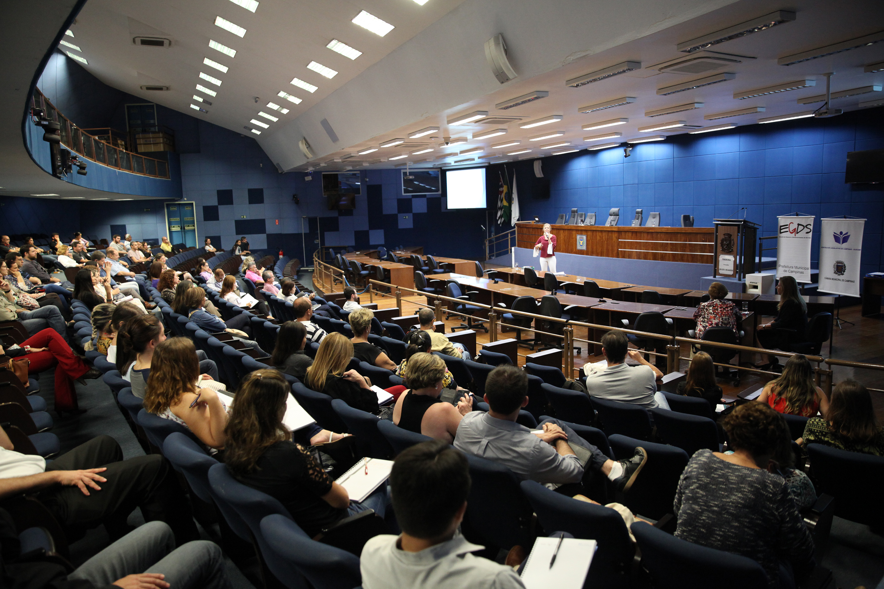 Foto Fernanda Sunega